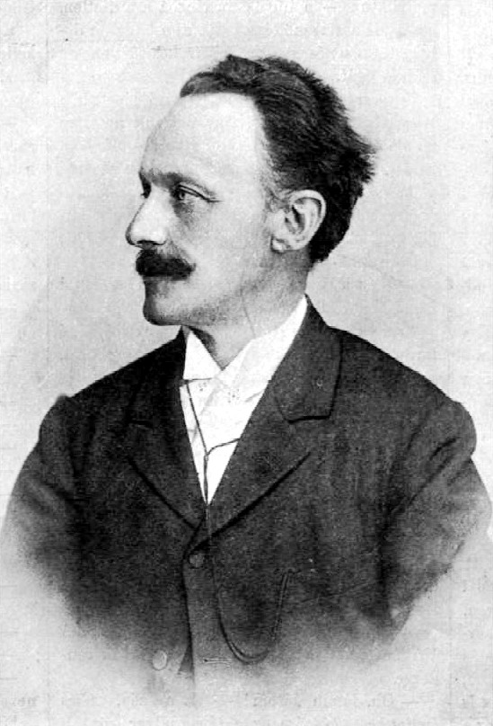 gróf Festetich Andor (1843–1930) politikus, miniszter portréja. Ellinger Ede fényképfelvétele